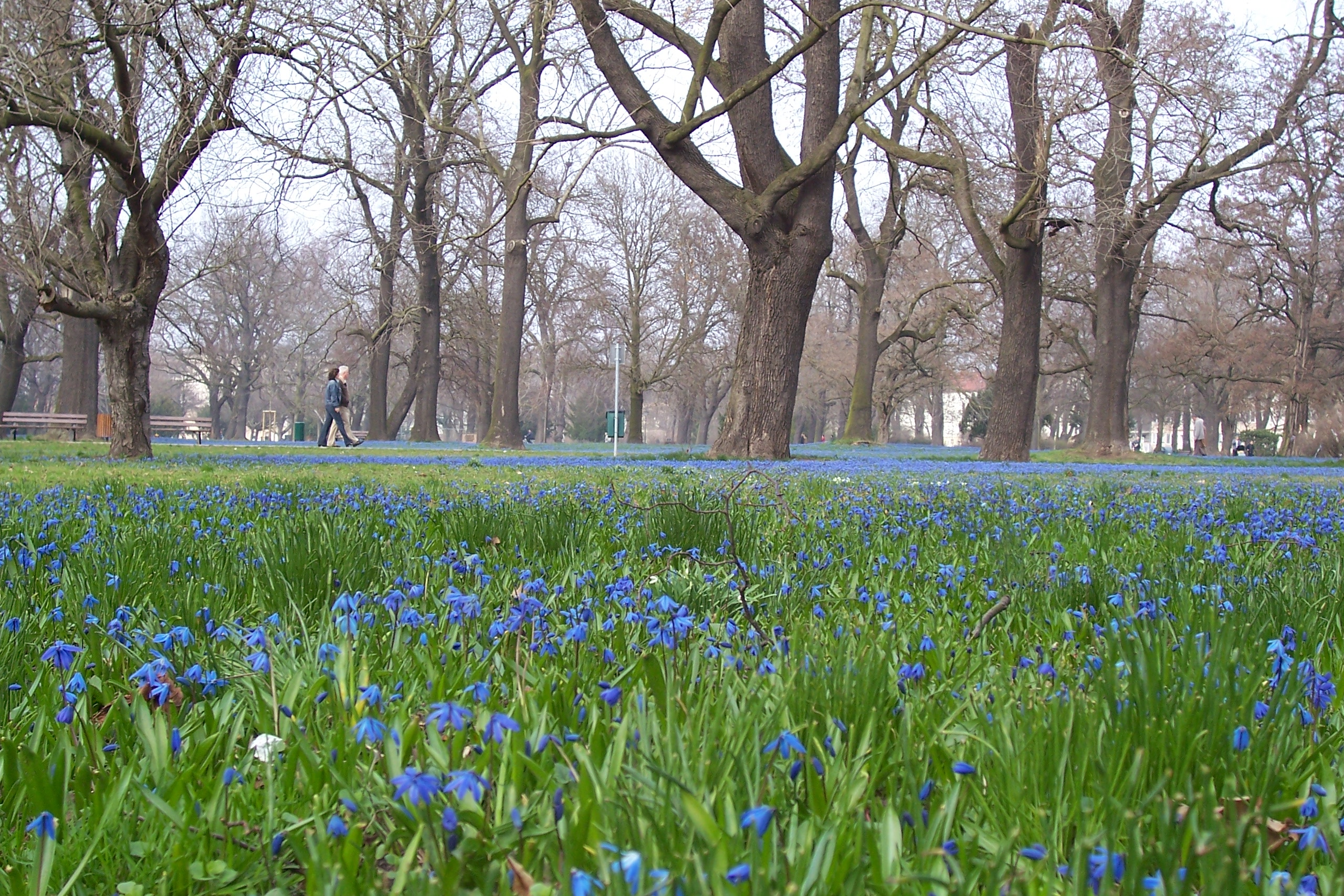 Nordpark in Magdeburg, Sachsen-Anhalt. 52º 8' 34.55" N 11º 38' 44.29" E